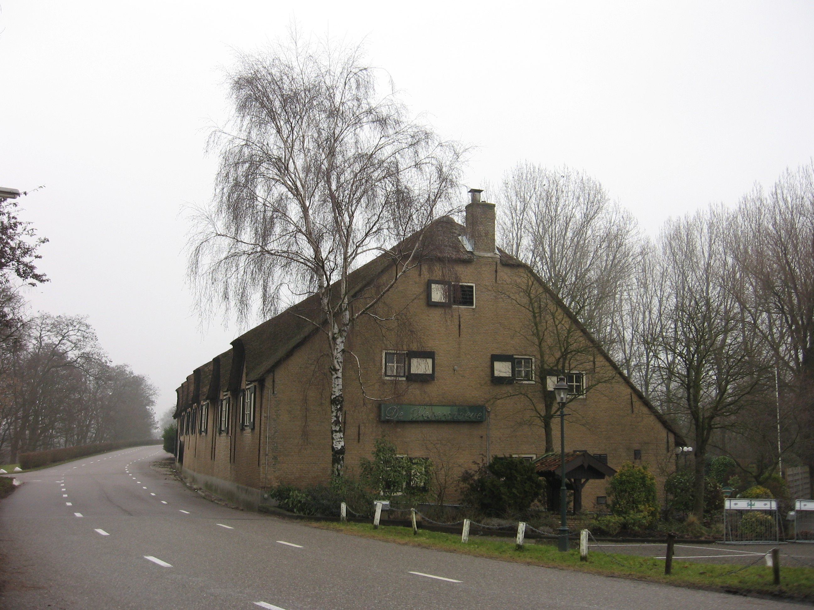 Rijsoord - "de wevershoeve" - Rijksmonument 32513